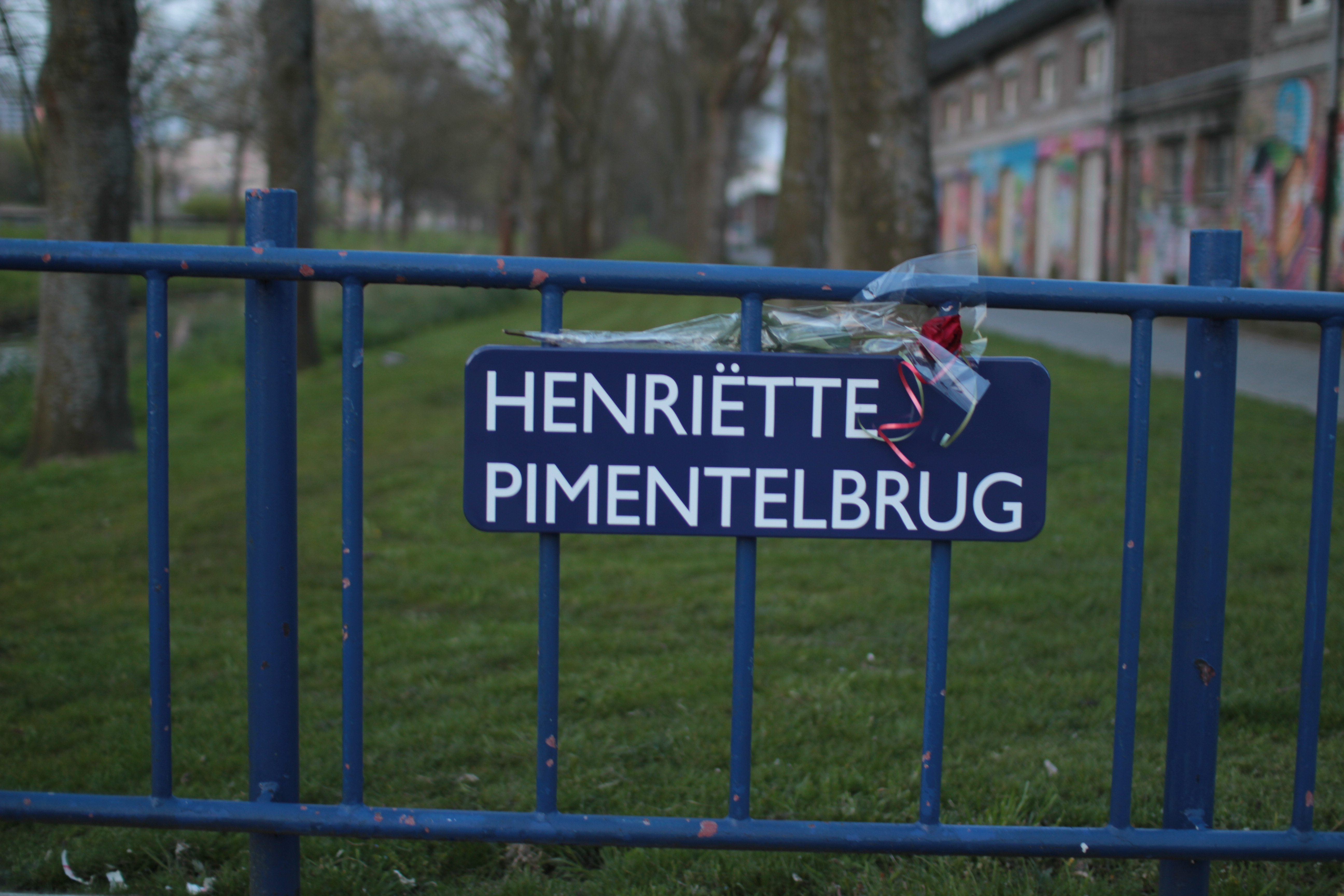 De Henriëtte Pimentelbrug in de Amsterdamse wijk Slotermeer